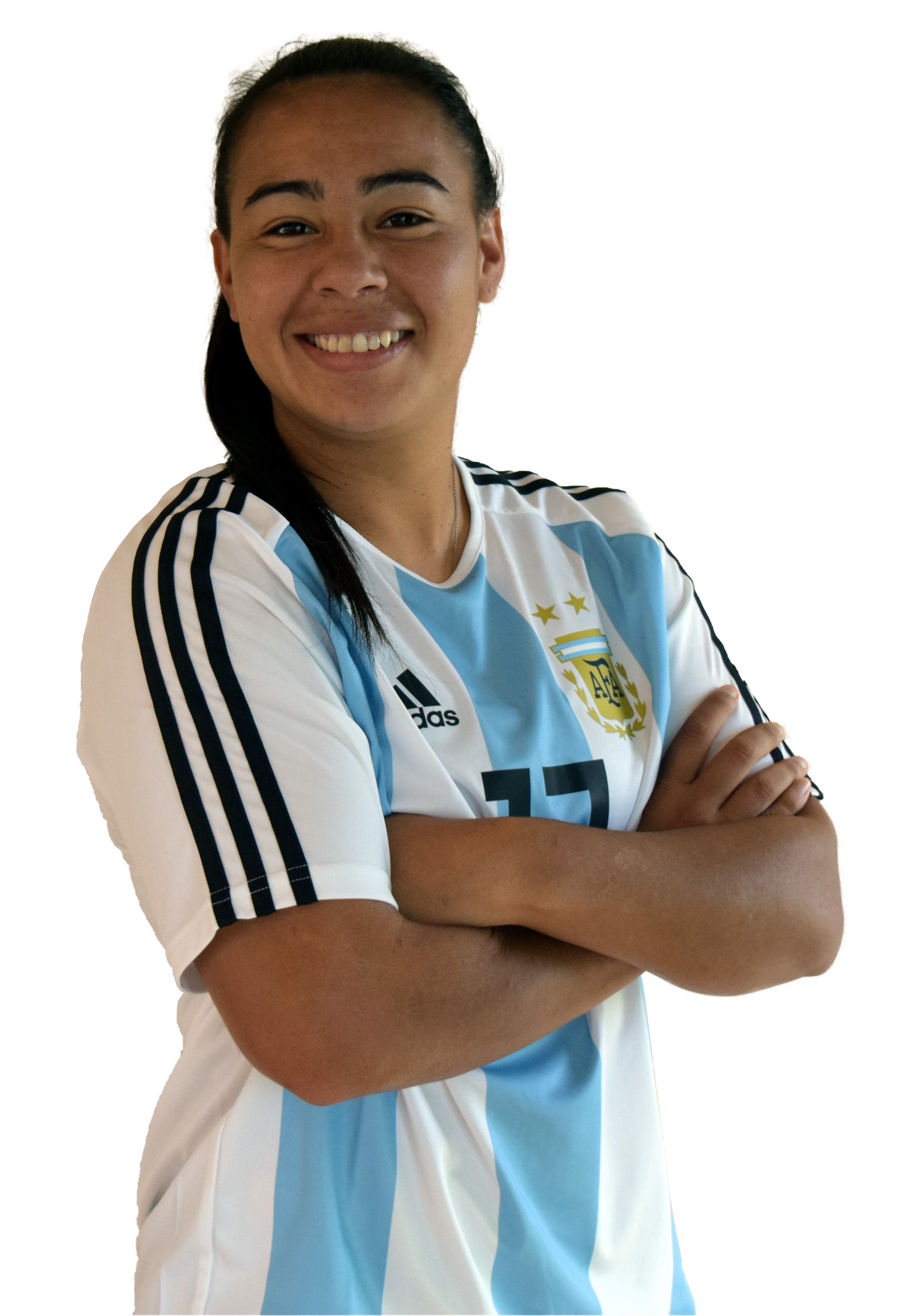 Yael Oviedo, jugadora de la selección mayor femenina de fútbol de Argentina.Foto sacada previo al primer partido del repechaje por un lugar para el mundial de futbol femenino de Francia 2019